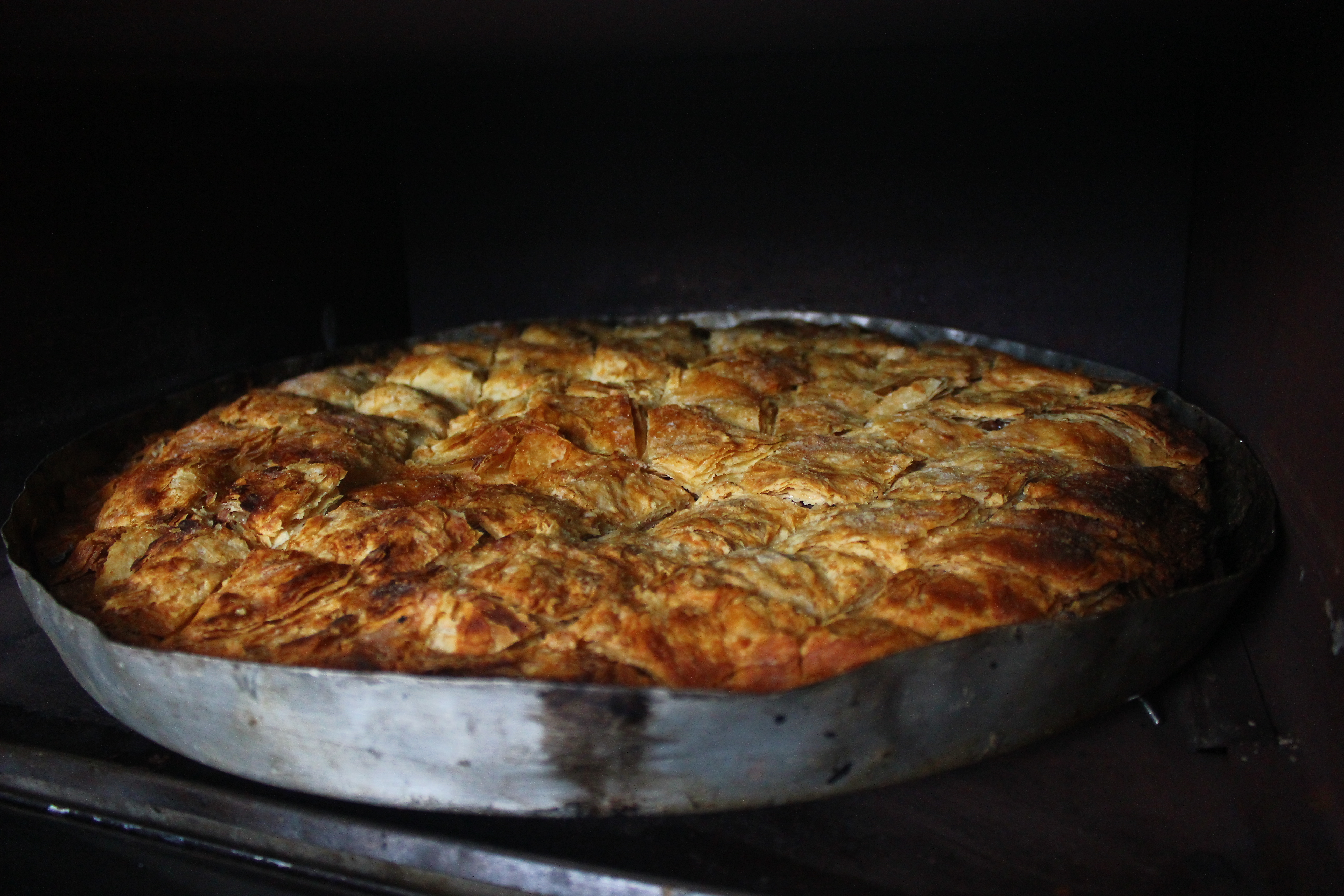 Bakllava, ëmbëlsirë që gatuhet me rastin e festës së Bajramit, festë kjo e besimtarëve Musliman.